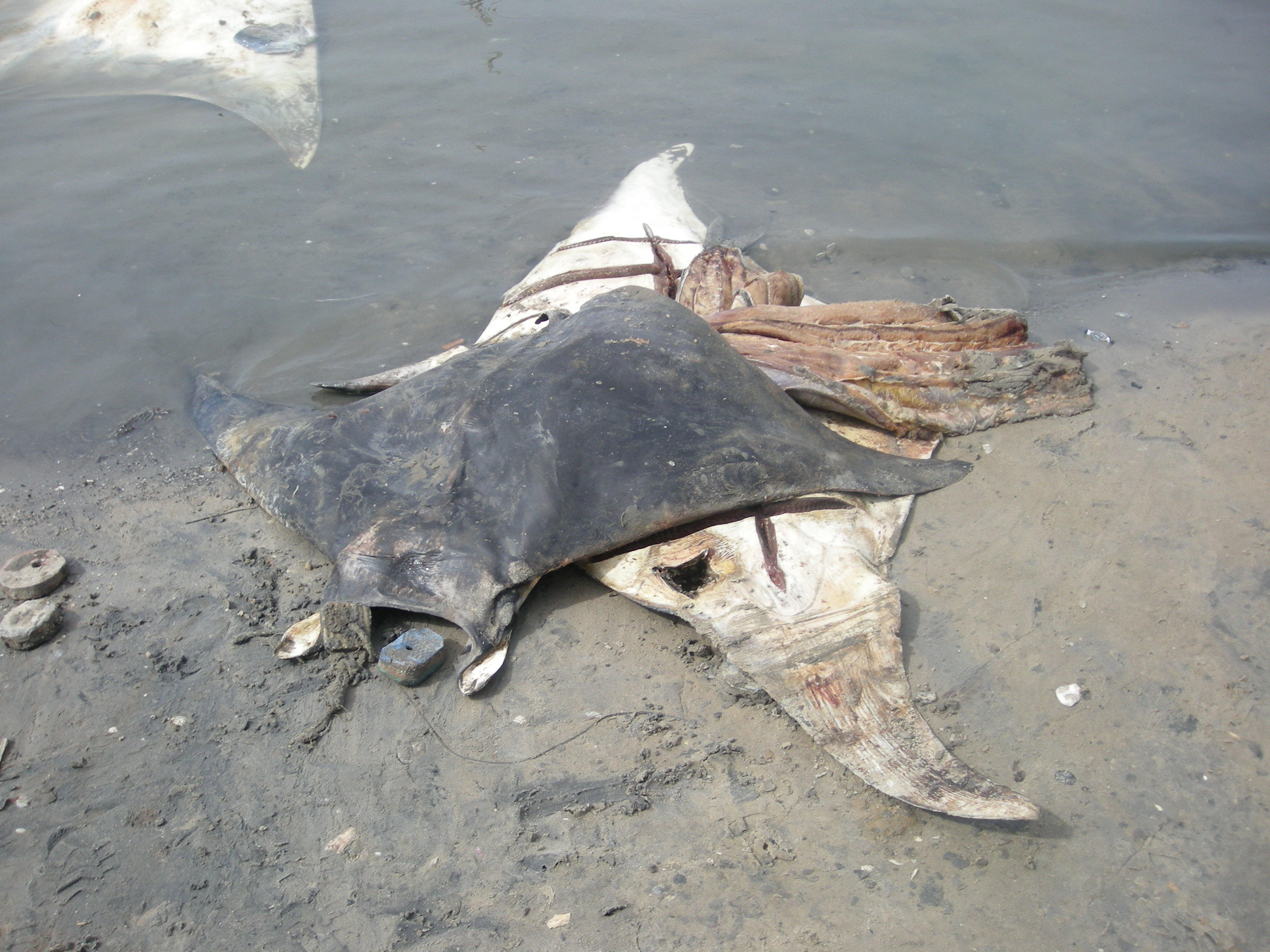 Raies manta pêchées à Elinkine (Casamance, Sénégal)